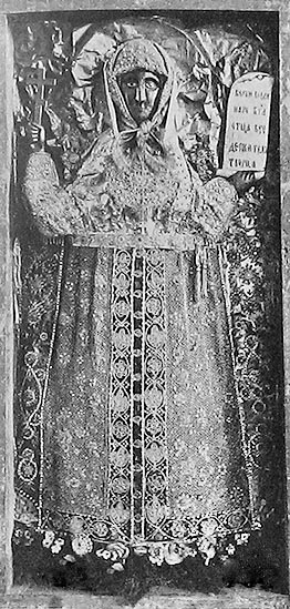 Святая Параскева-Пятница. Фото начала XX в. По преданию, еще Шемяка пожаловал древнему, стоящему в г. Галич Пятницкому храму, резное изображение святой Параскевы.